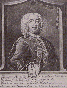 Spottdarstellung des Joseph Süß Oppenheimer mit dem eisernen Stuttgarter Galgen als Emblem am unteren Bildrand. Kupferstich (1738): Inschrift: Wer grosser Herren Gunst misbraucht mit bösen Rath Wie dieser freche Jud Süss Oppenheimer that, Wen Geitz und Übermuth, auch Wollust eingenommen, Der mus wie Haman dort zu letzt an Galgen kommen